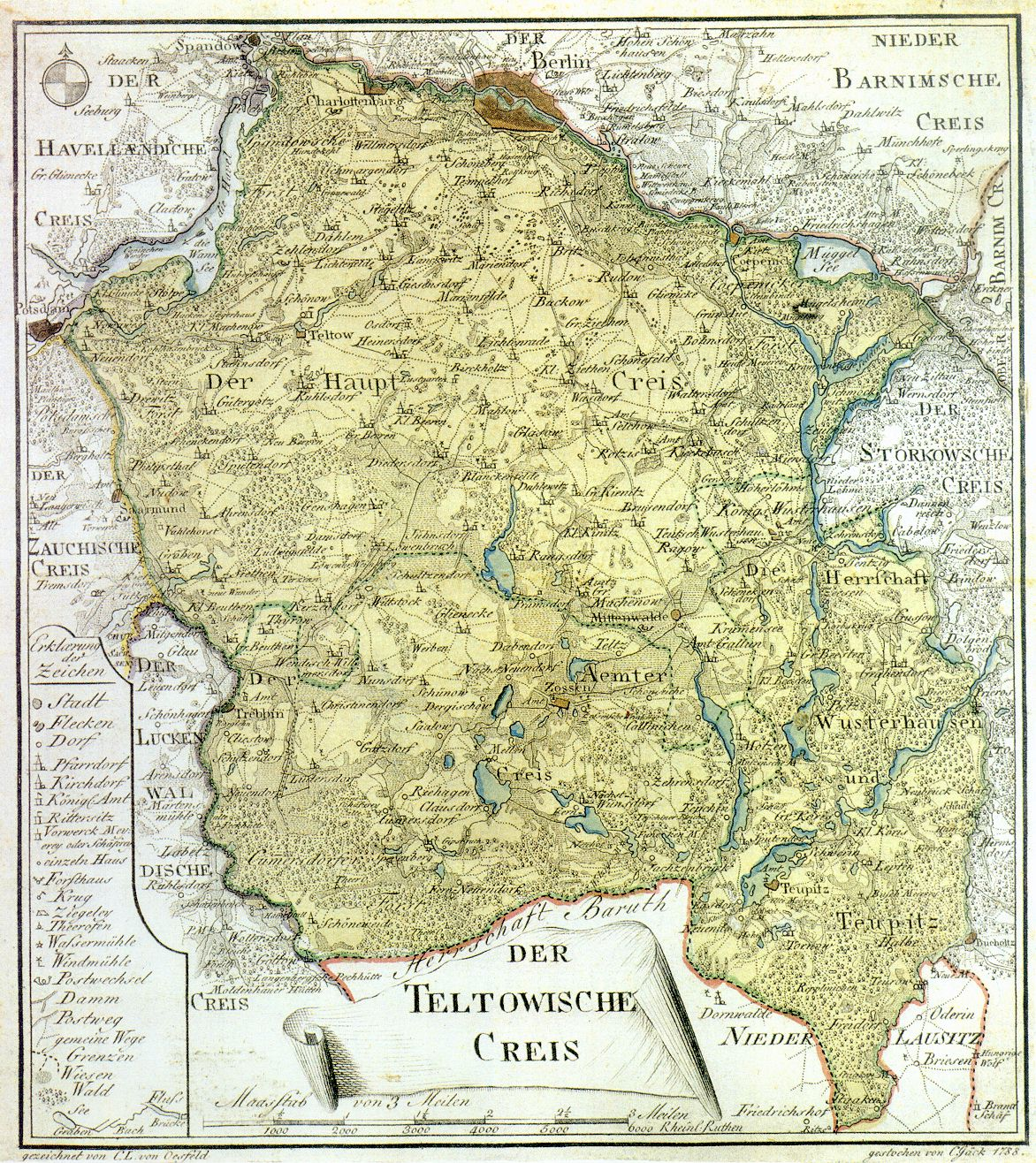 Plan des Kreises Teltow